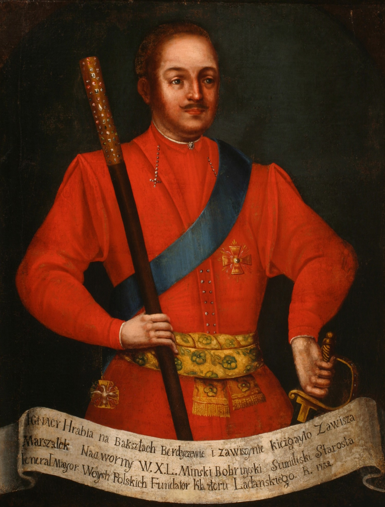 Беларуская (тарашкевіца): Партрэт Ігнація Аніцэты Завішы (Ihnaci Aniceta Zaviša) гербу «Лебедзь» (каля 1690 — 1738), дзяржаўнага і вайсковага дзеяча Вялікага Княства Літоўскага, мечніка і падкаморыя, маршалка надворнага; генэрал-маёра кавалерыі.